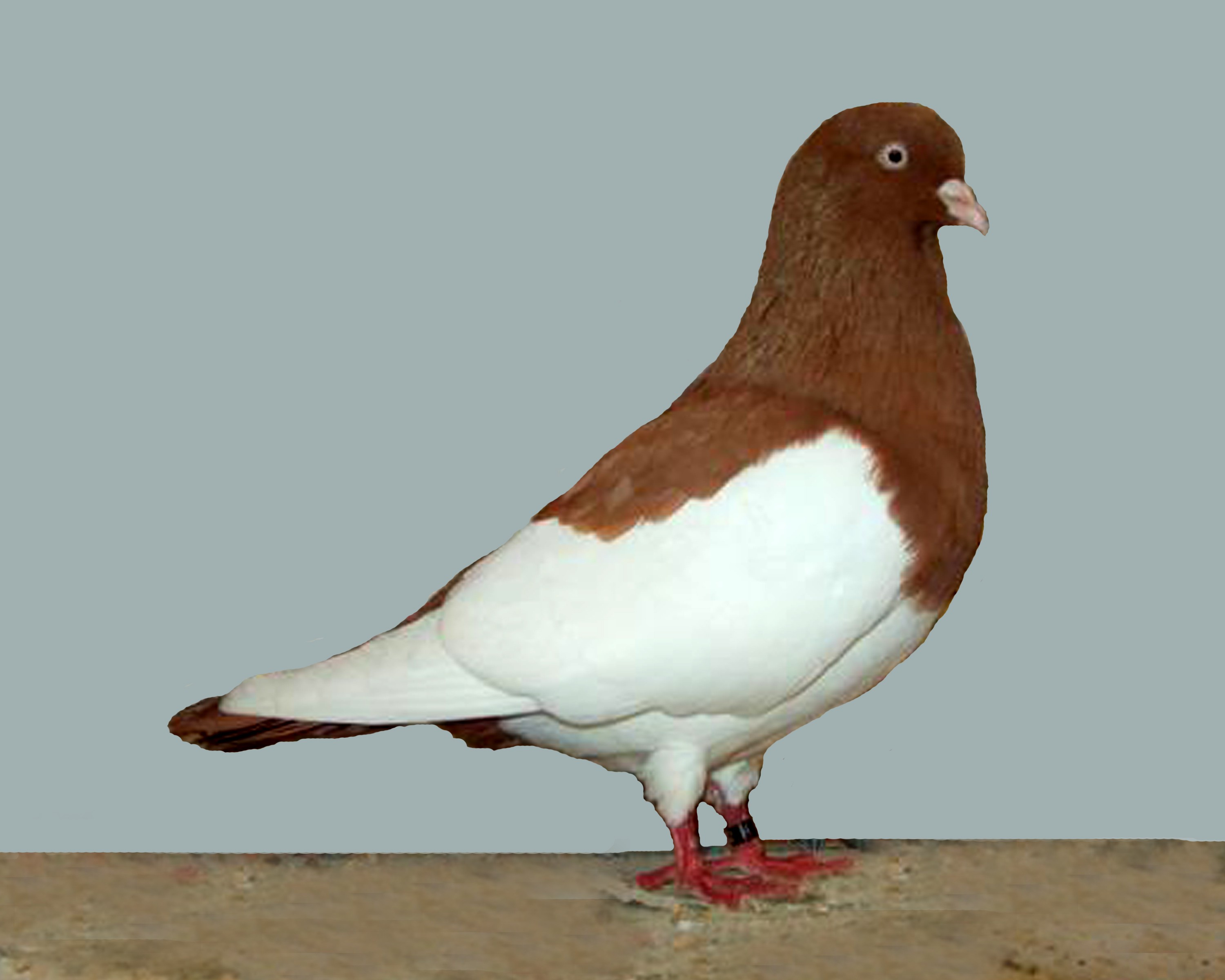 Cologne Tumbler (Red Magpie-Marked)